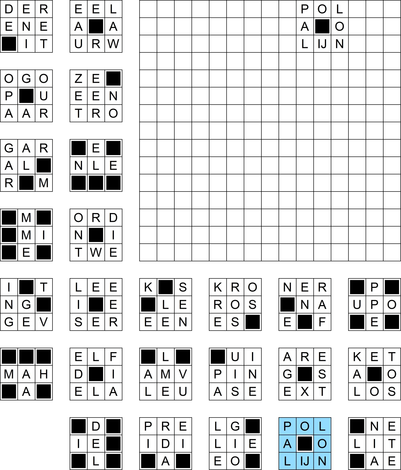 Nederlandse blokpuzzel waarbij een blokje reeds is ingevuld.